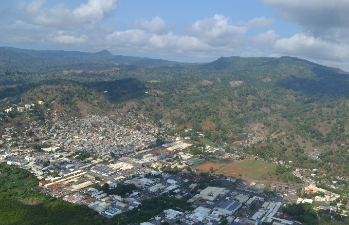 Ville vue d’en haut